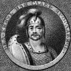 Вел. князь Изяслав Ярославич.